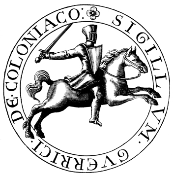 Jean du Bouchet, Histoire de la maison de Coligny (1662). Image scannée et retravaillée par Roch de Coligny.